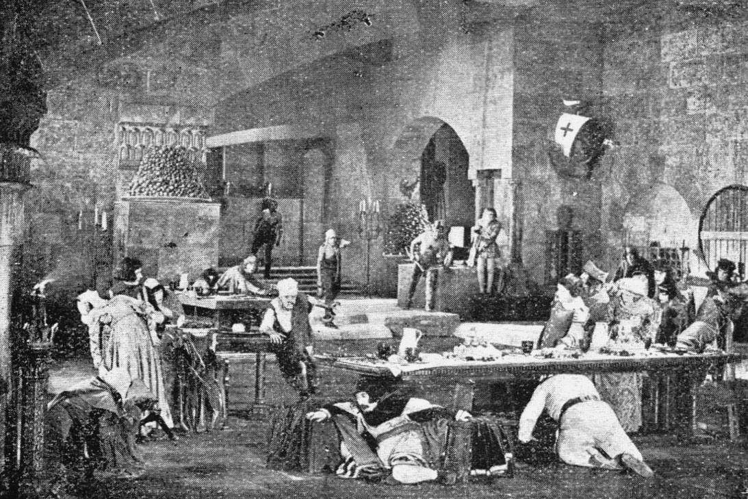 Fotogramma del film muto Frate Francesco, regia Giulio Antamoro (1877-1945), produz ICSA Firenze Rifredi, 1926